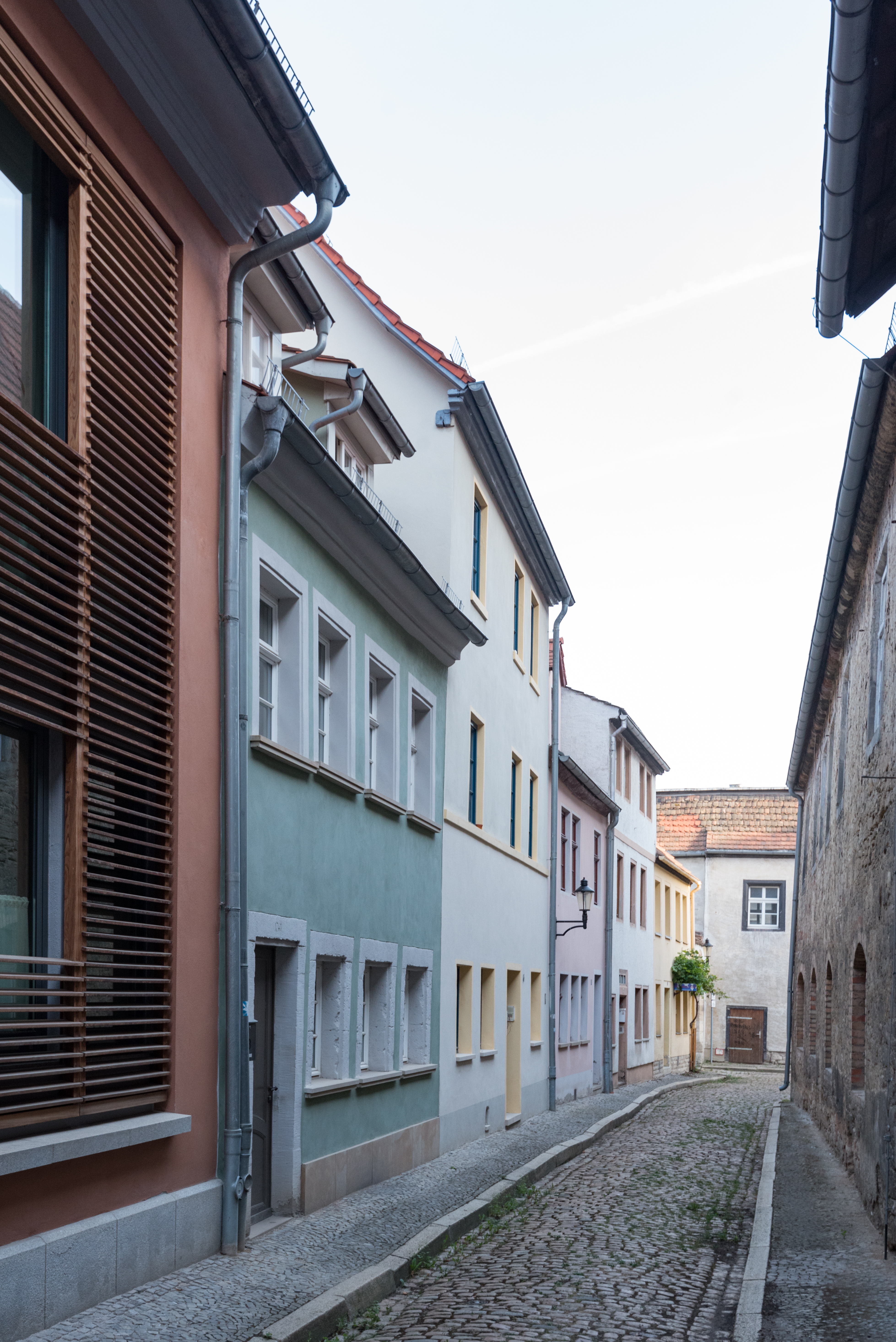 Naumburg (Saale), Jüdengasse 3